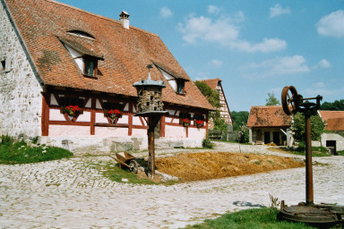 Gebäude im Fränkischen Freilandmuseum Bad Windsheim, aufgenommen am 04.09.2004